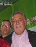 Vitor Ramalho no Stand do PS nas Festas em Honra da Nossa Senhora do Rosário na Moita.